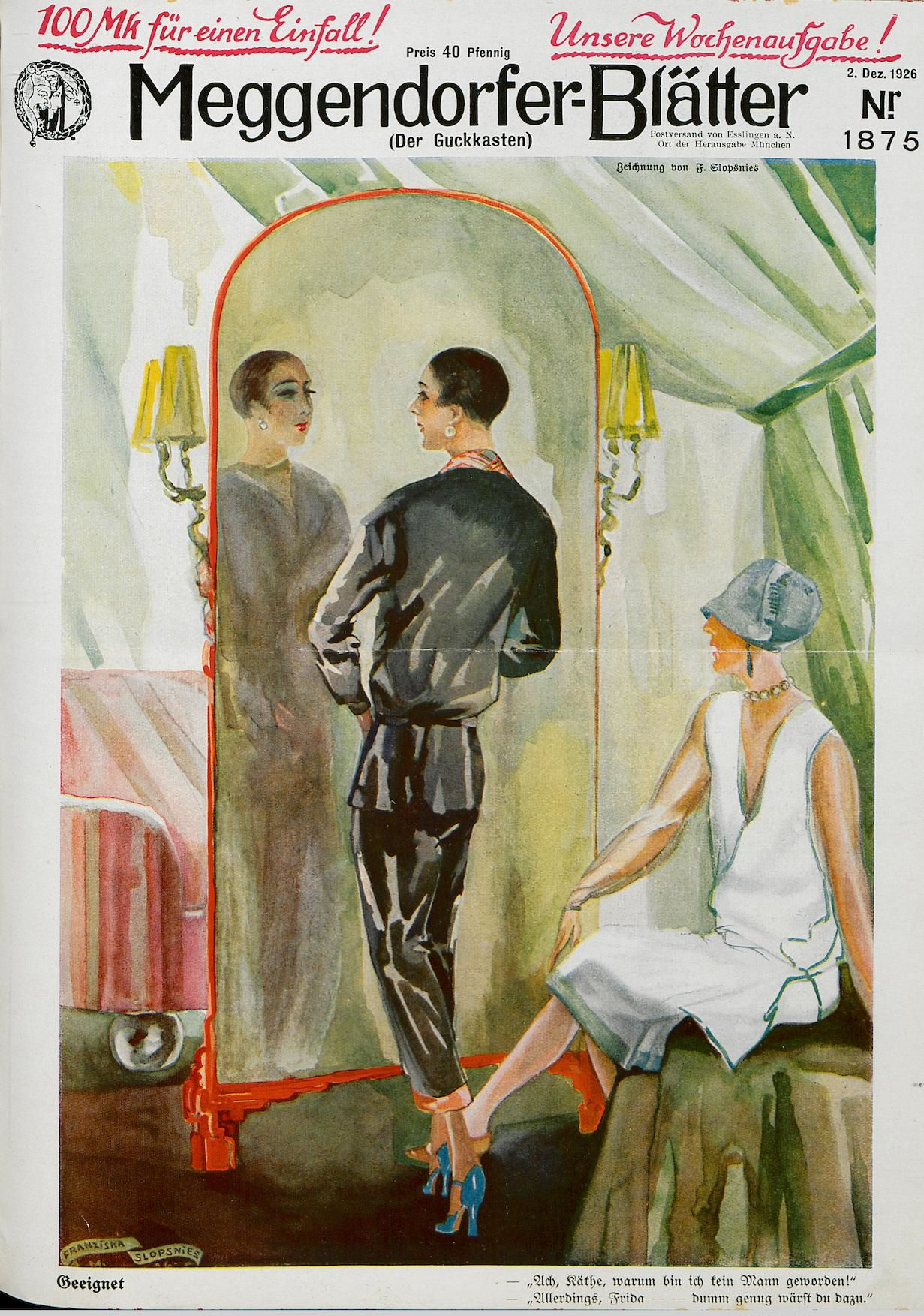 Franziska Schlopsnies (Slopsnies): Titelblatt der Meggendorfer-Blätter, Nr. 1875, vom 2. Dezember 1926